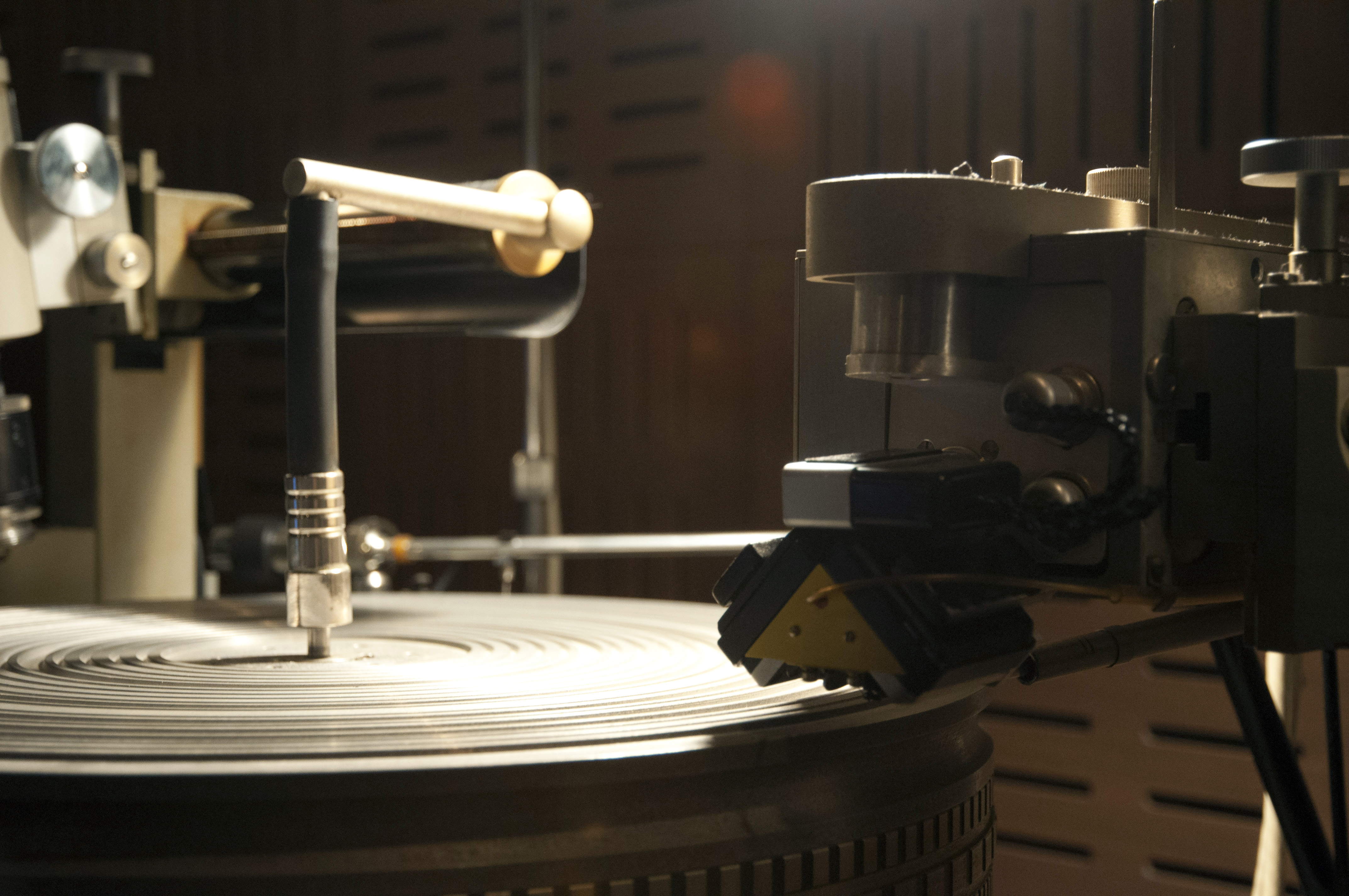 Neumann Record Cutting Machine